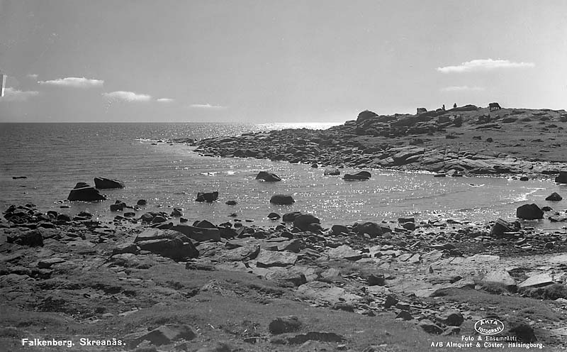 Motiv: Skreanäs Nyckelord: Riksintressen Kategori: Kust- och skärgårdsmiljöSkreanäs